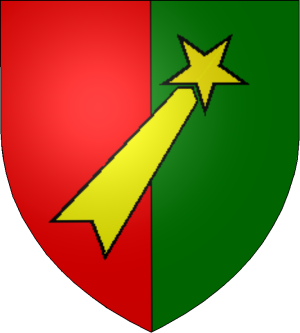 Blason Rhin Danube 3D Source: dessiné par 20px WikiMeGa***-@@@-fr 23 août 2006 à 10:33 (CEST)